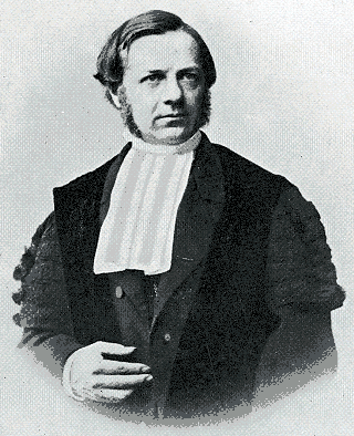 C.H.D. Buys Ballot (omstreeks 1857)